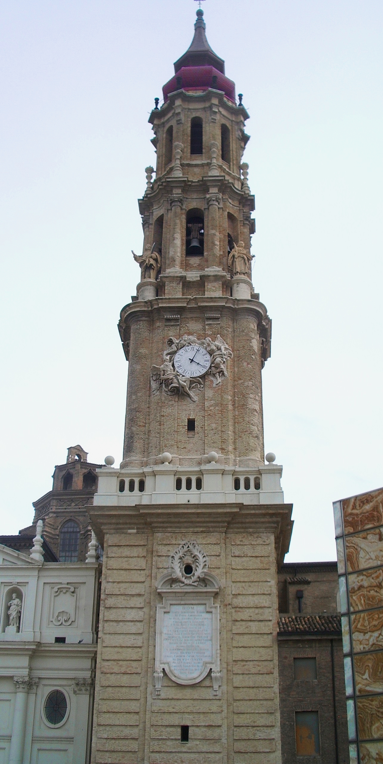 Torre de La Seo